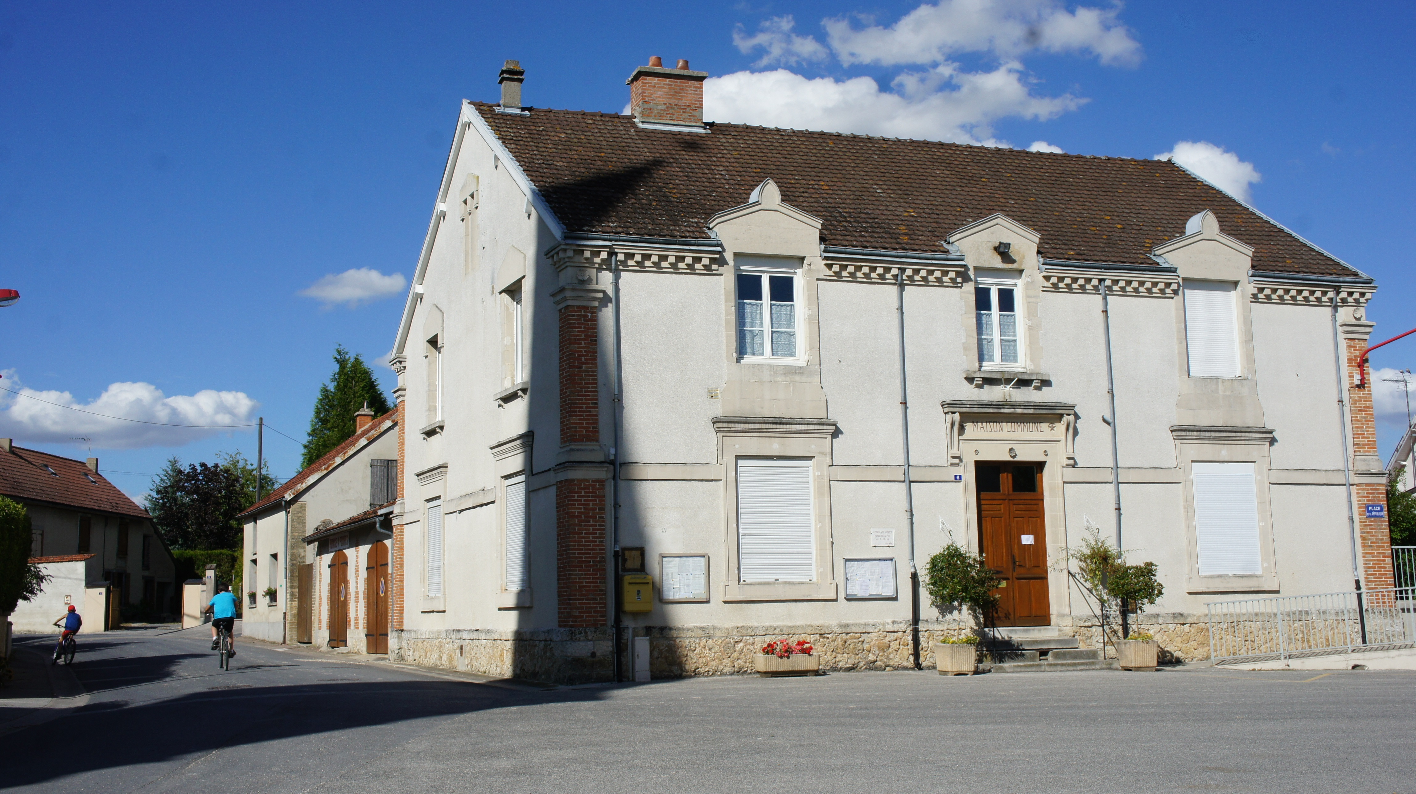 Vue de la Maison commune d'Aigny.